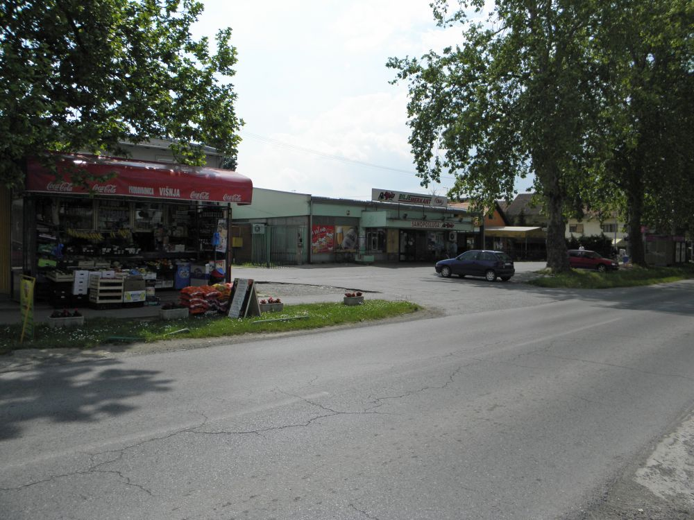 Centar Višnjevca; u prvom planu samoposluga. Svibanj, 2011.